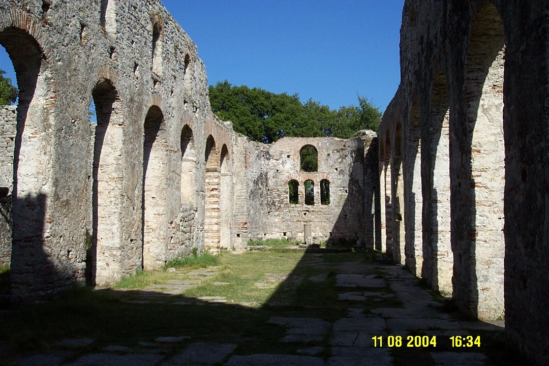 Fotografie baziliky v historickém městě Butrint v Albánii